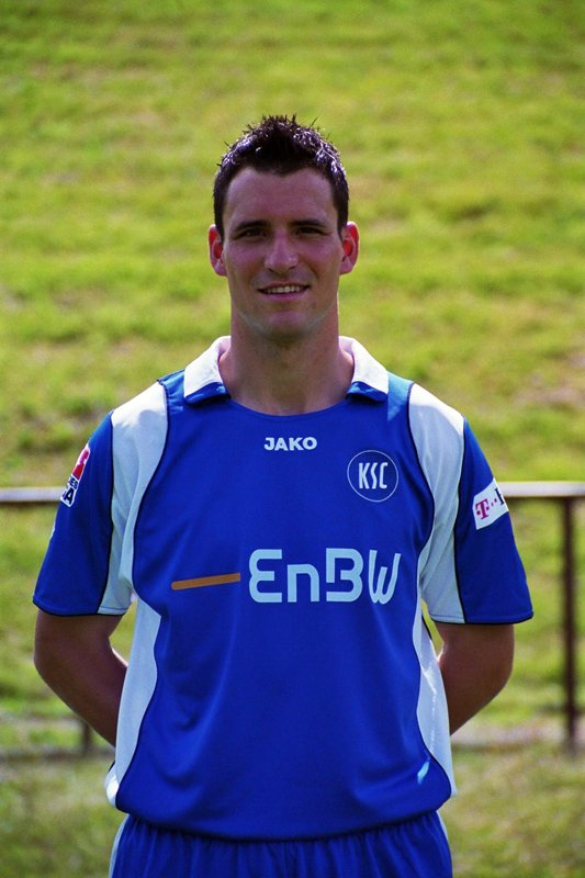 Mario Eggimann